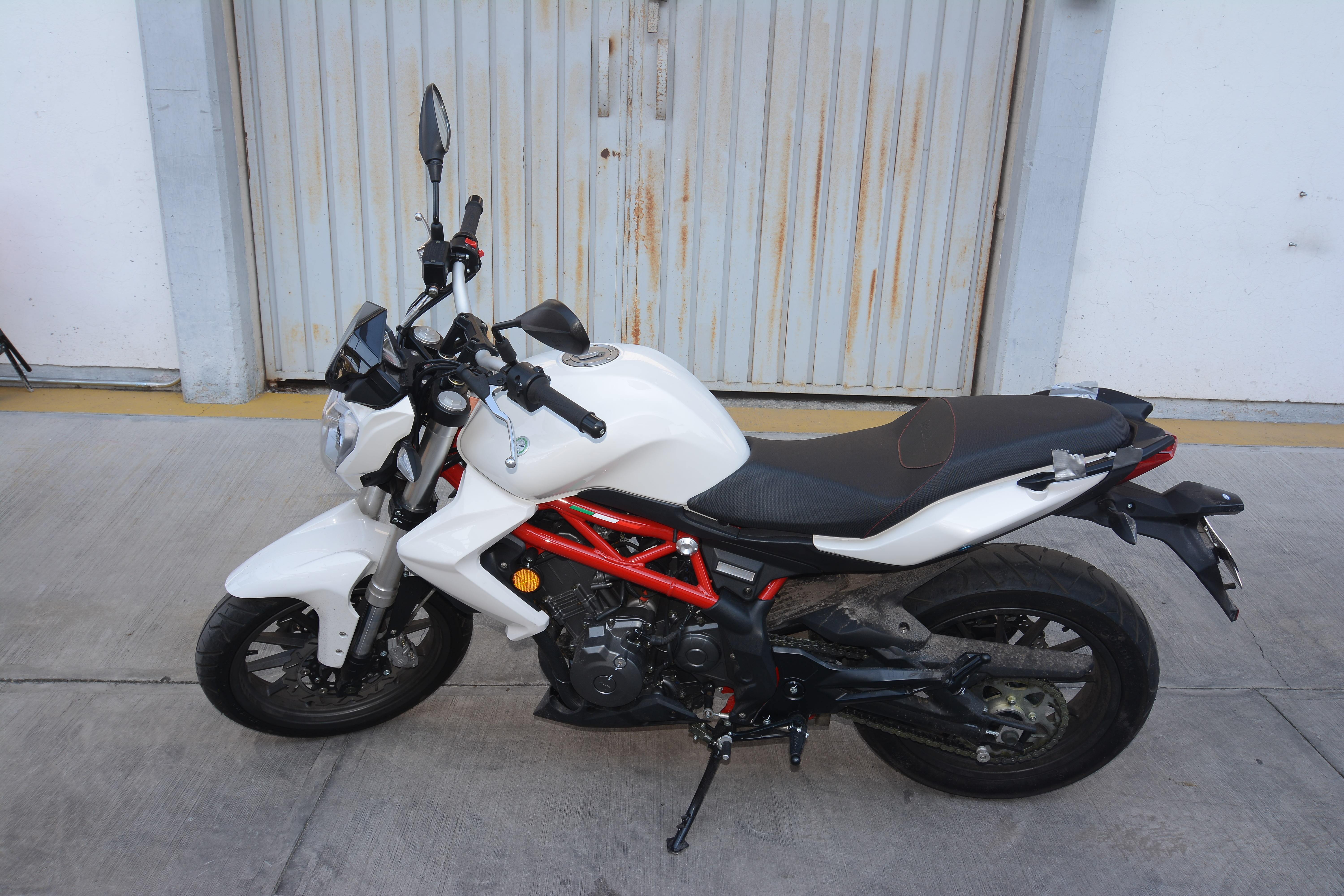 Motocicleta Benelli TNT 300 Blanca con rojo modelo 2016 lado izquierdo Foto175